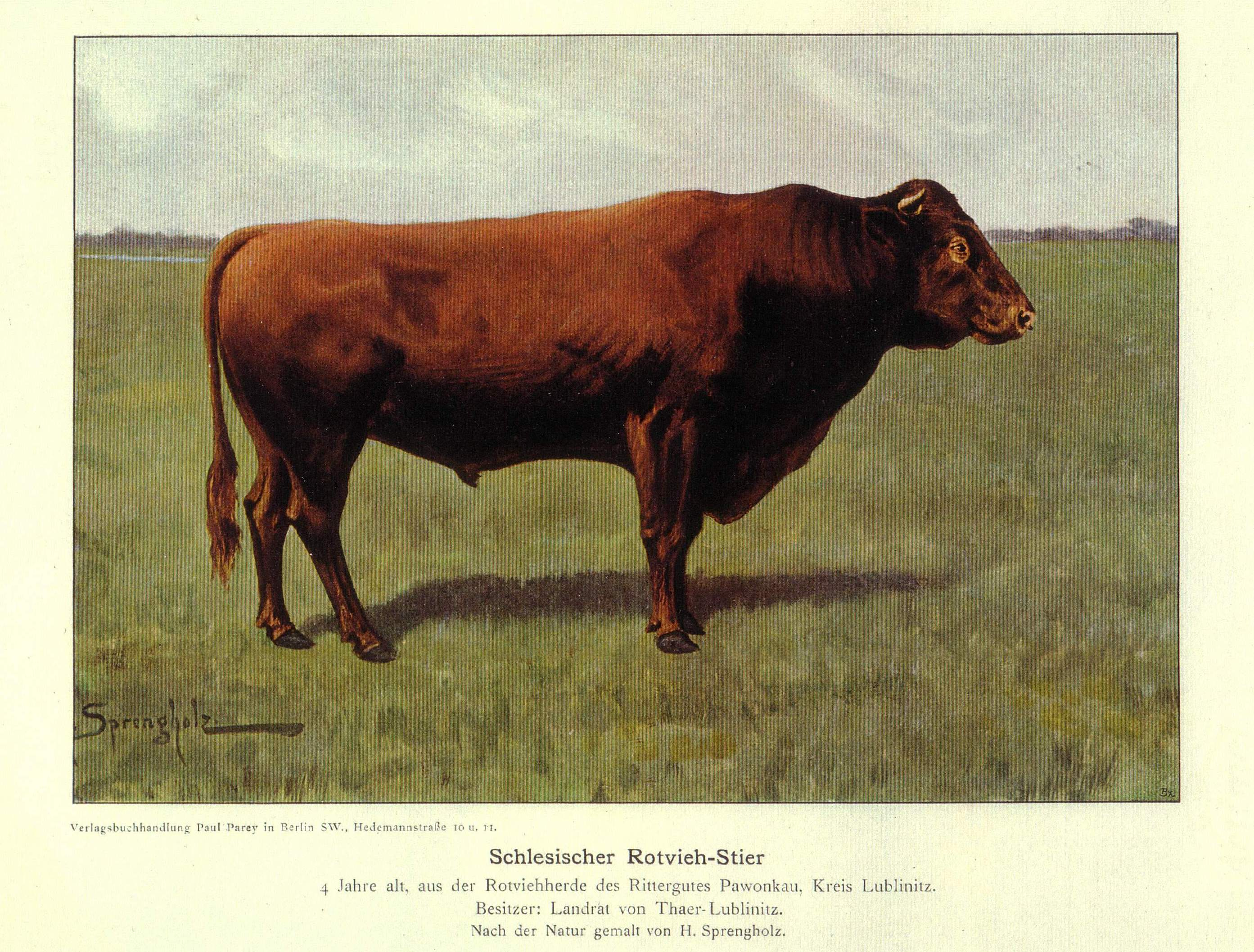 Schlesischer Rotvieh-Stier. 4 Jahre alt, aus der Rotviehherde des Rittergutes Pawonkau, Kreis Lublinitz, Besitzer: Landrat Georg von Thaer. Gemalt von H. Sprengholz